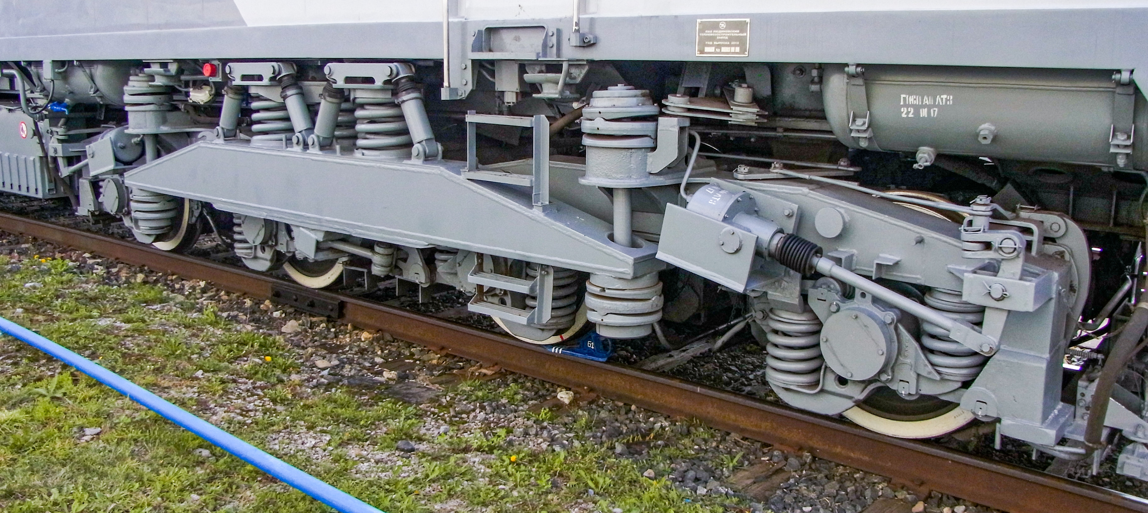 Передняя тележка тяговой секции газотурбовоза ГТ1h-002